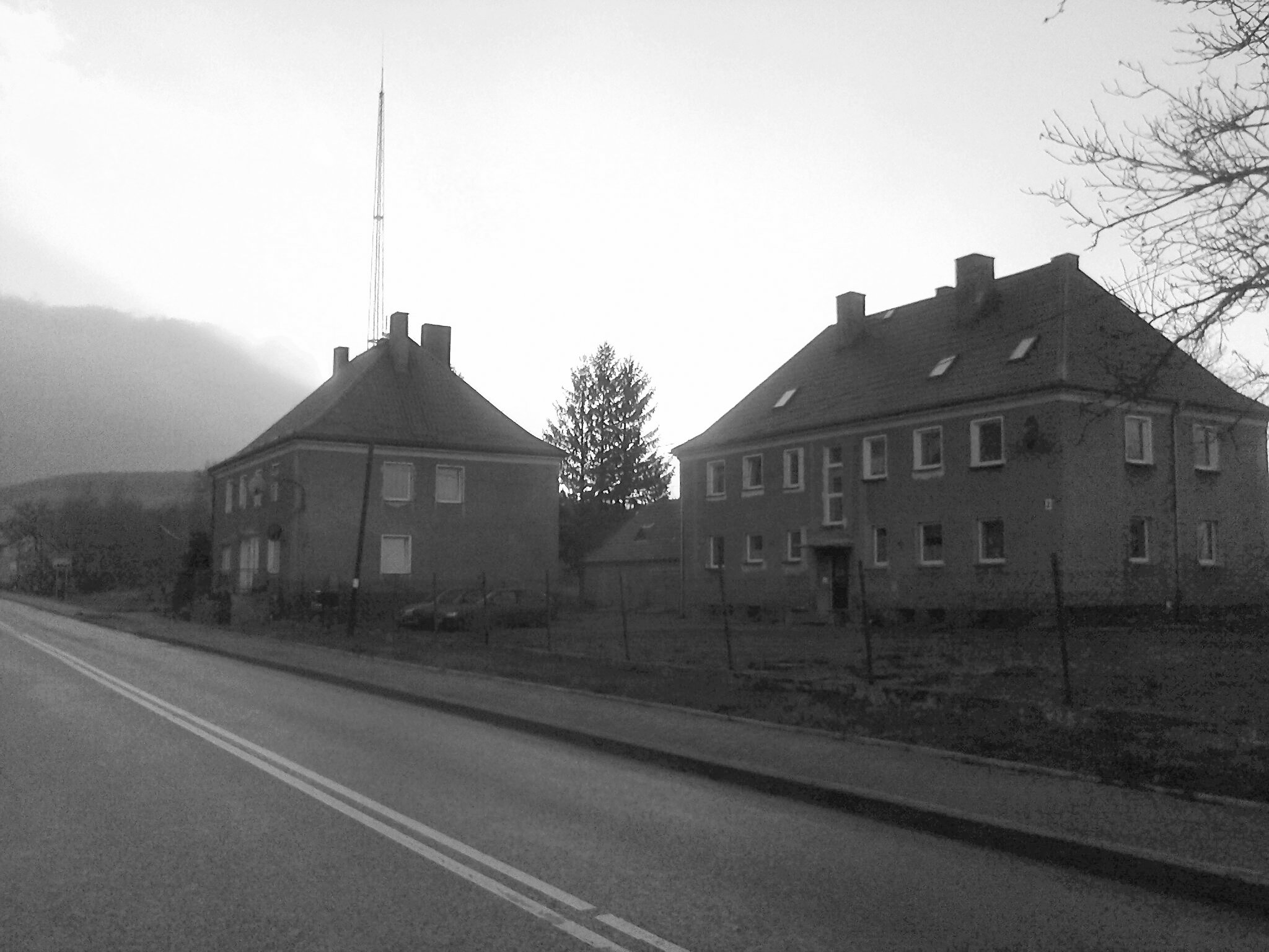 Blok mieszkalny. Od 1945 do 2003 roku Strażnica Wojsk Ochrony Pogranicza i Straży Granicznej w Trzebinie z blokiem kadry — widok od strony polskiej.